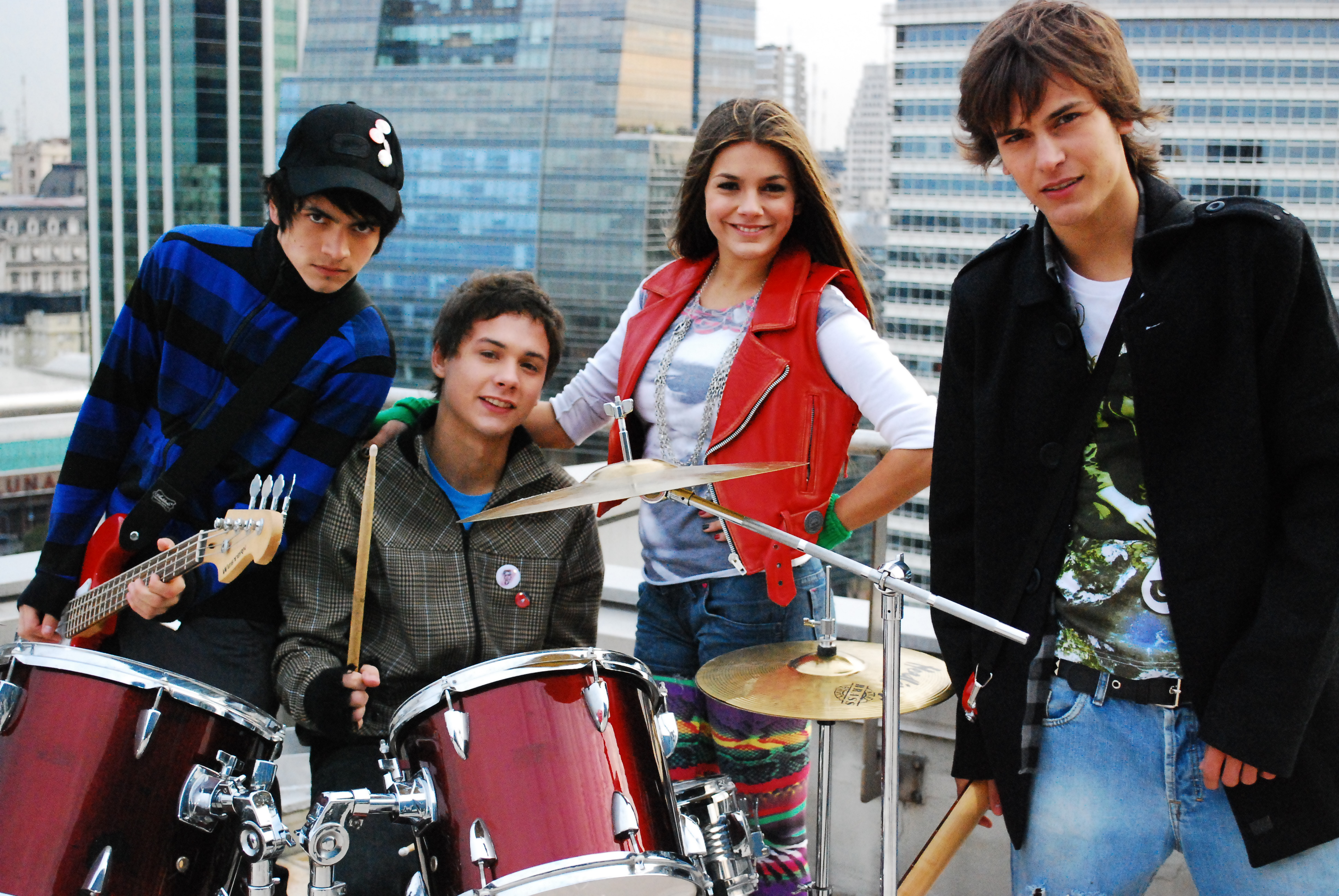 Consentidos